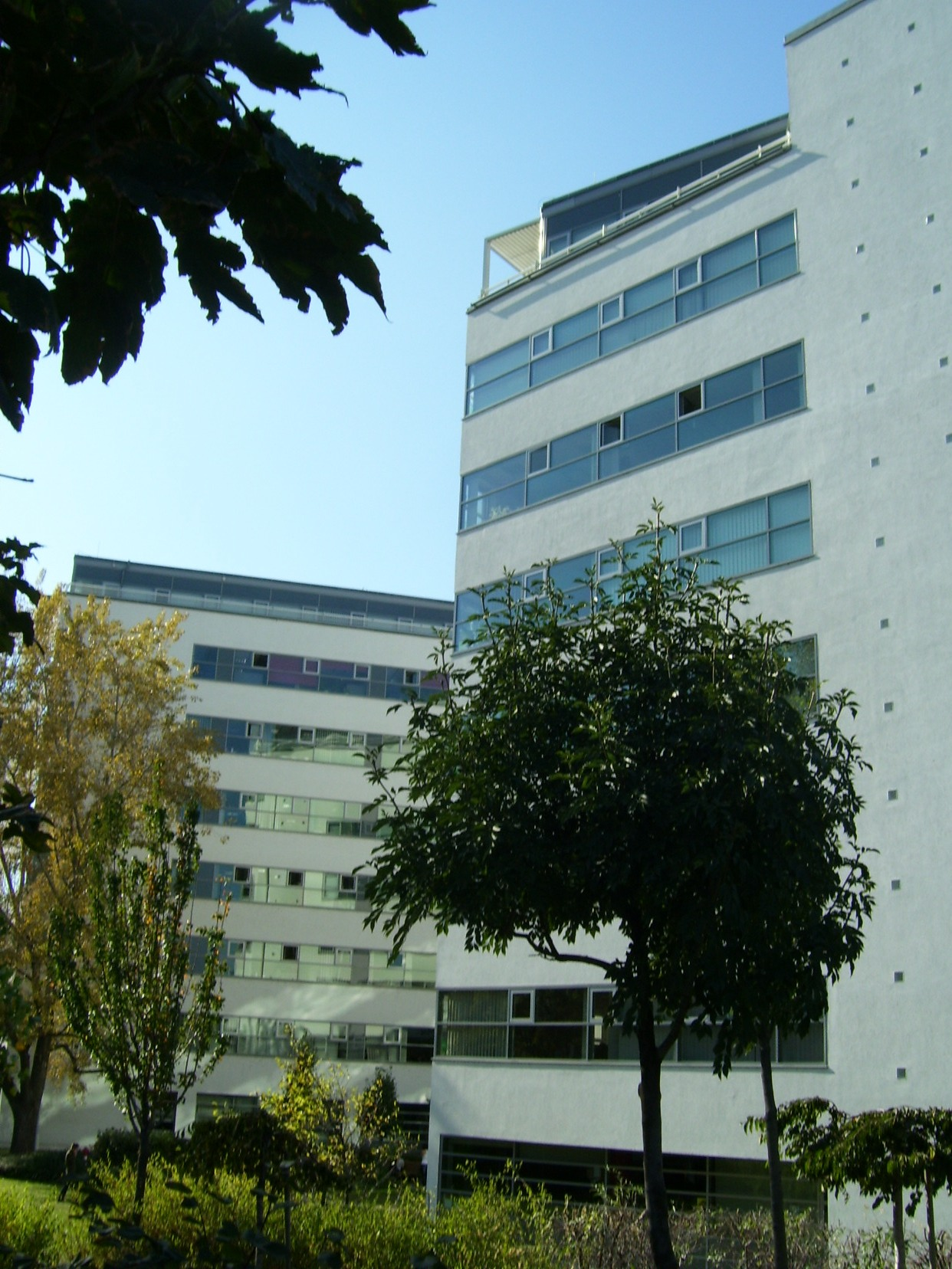 Science Park Irodaház (Cságoly Ferenc, Nagy Iván, 2003) a XI. kerületi Irinyi utcában, Budapest